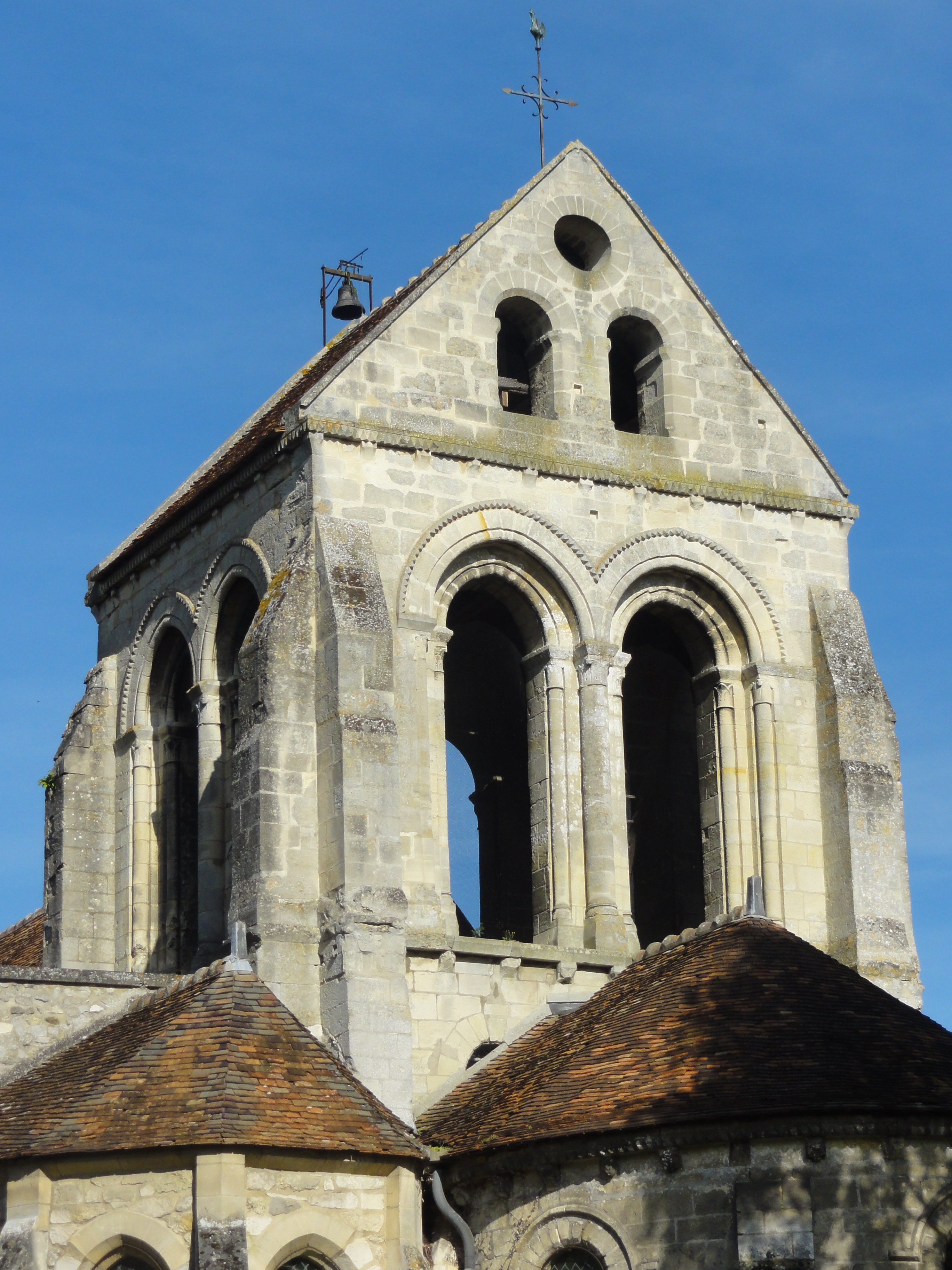 Clocher, vue depuis l'est.